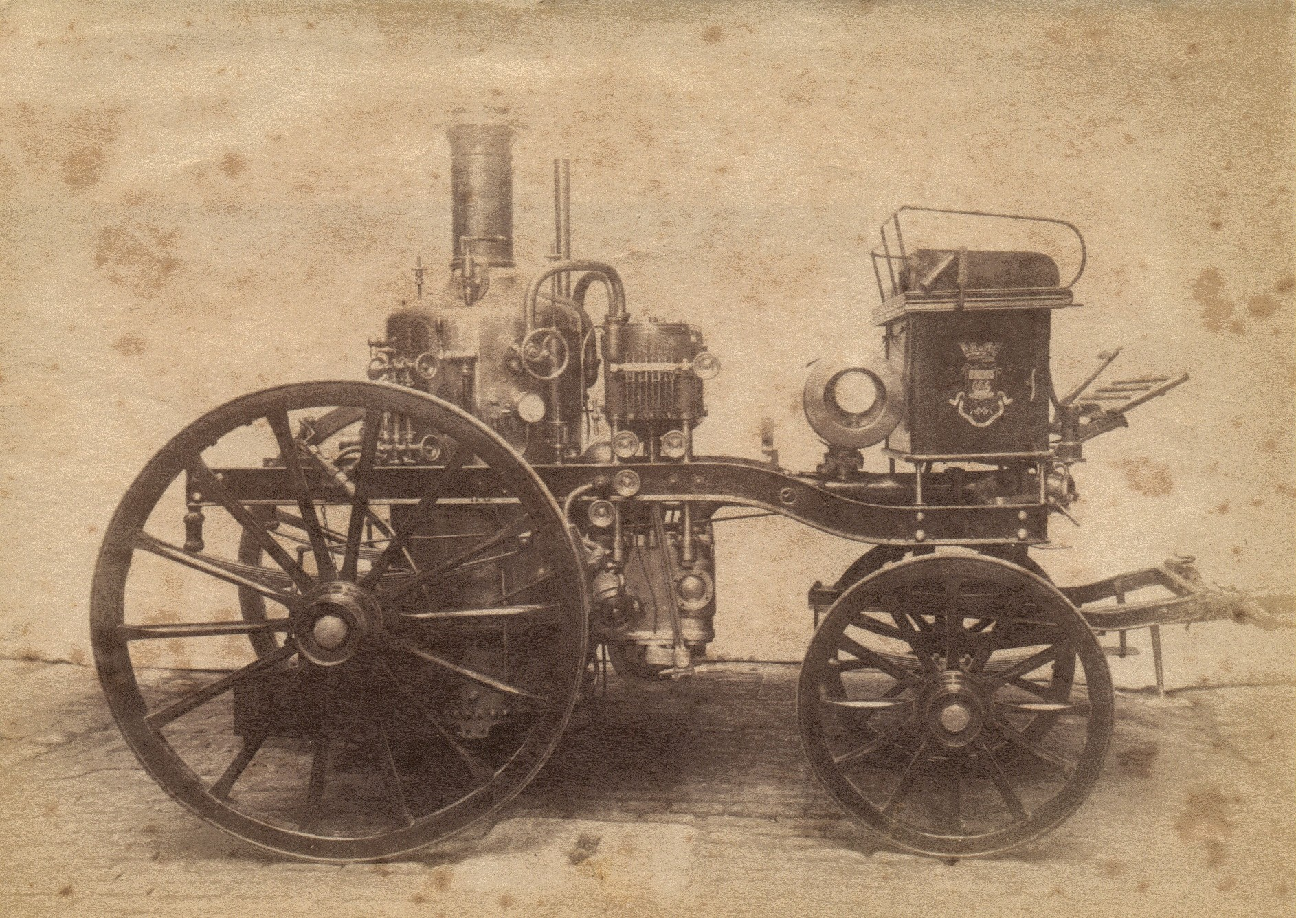 La pompe à vapeur Durenne & Krebs, modèle 1888, vue de Profil selon Brevet Arthur Constantin Krebs